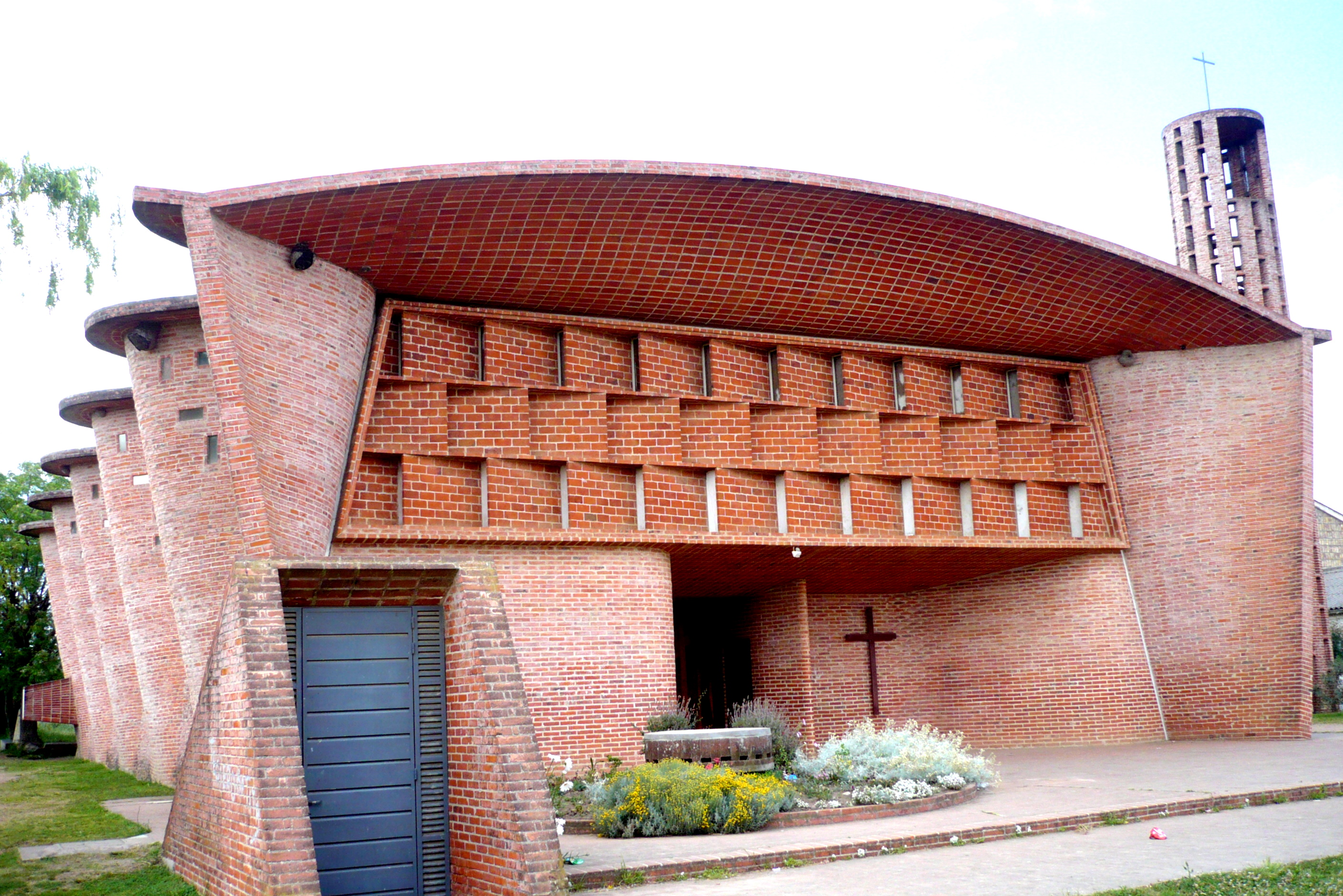 Parroquia del Cristo Obrero